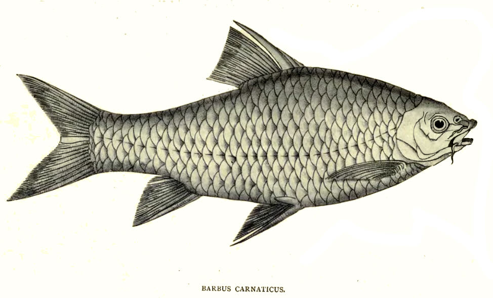 Barbus carnaticus = Barbodes carnaticus (Jerdon, 1849)